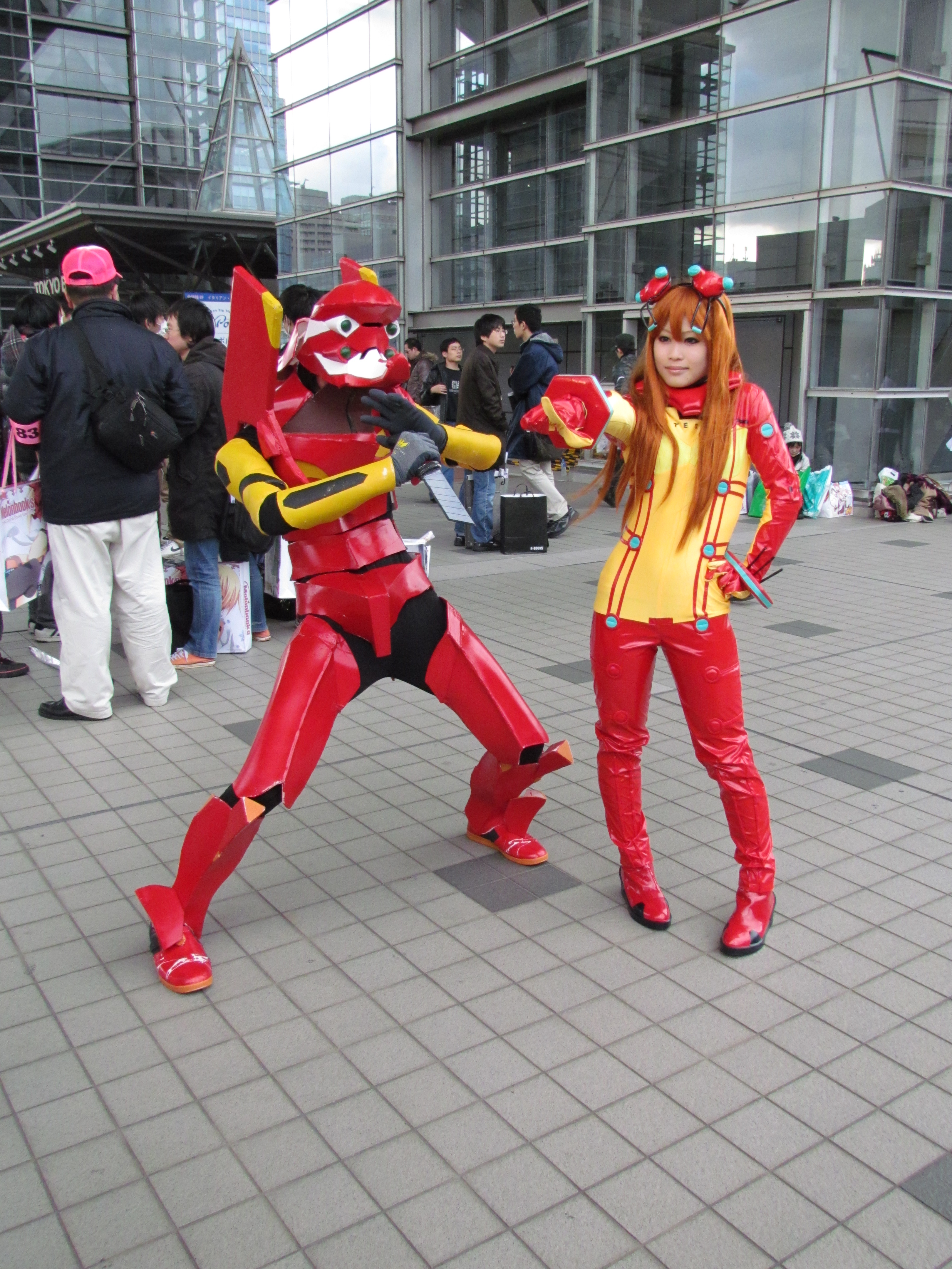 Comiket 83，《福音戰士新劇場版：破》EVA貳號機（左）、式波·明日香·蘭格雷（右）cosplayer。